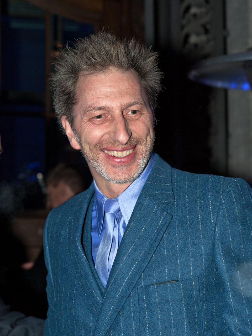 Rufus Beck, German actor, Berlinale 2012, ARD Degeto Blue Hour Party